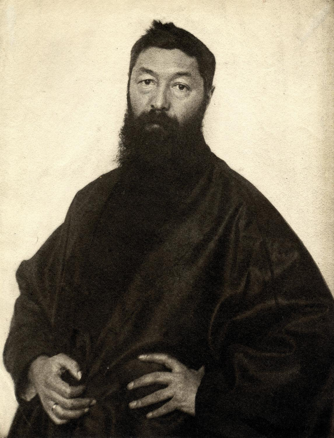 Portrait Georg Lührig von Hugo Erfurth, Dresden. 1911, Ölpigmentdruck. 37,1 x 28,6 cm, signiert und datiert. Sammlung Jack Daulton, USA.